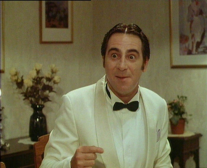 מוטי גלעדי בסרטו של יעקב גולדווסר, "מעבר לים ", 1991